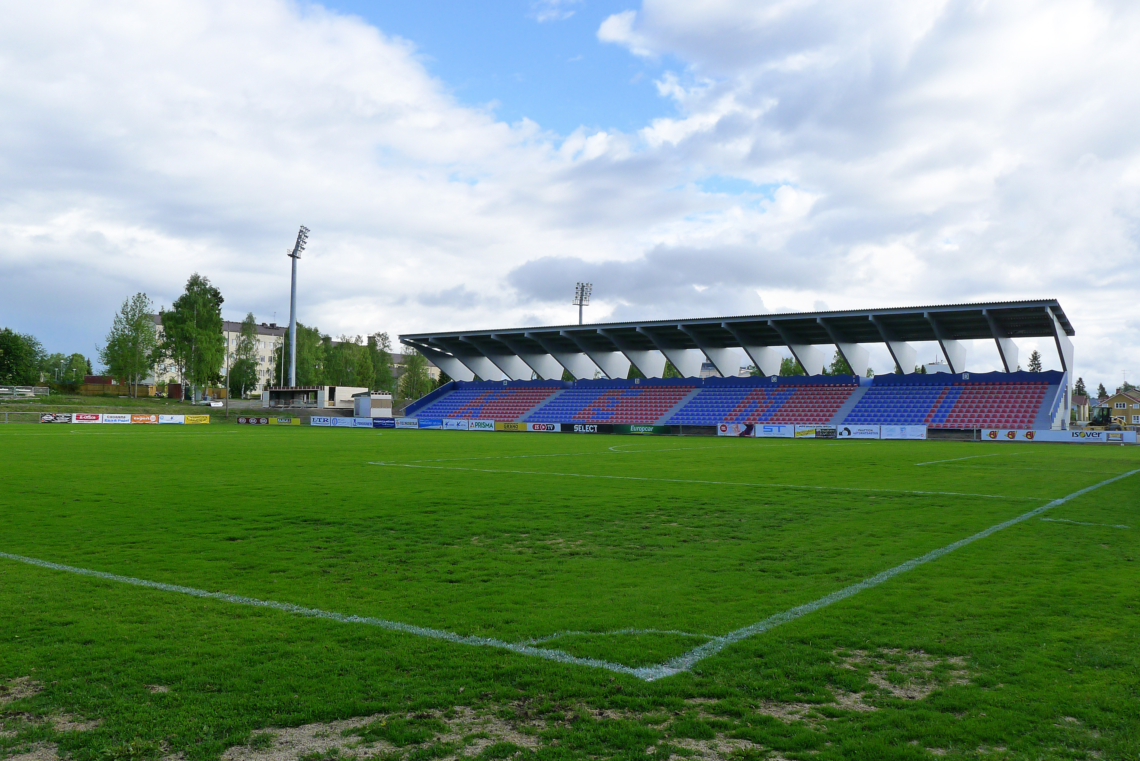 Sauvosaaren urheilupuiston takakenttä 14.6.2016